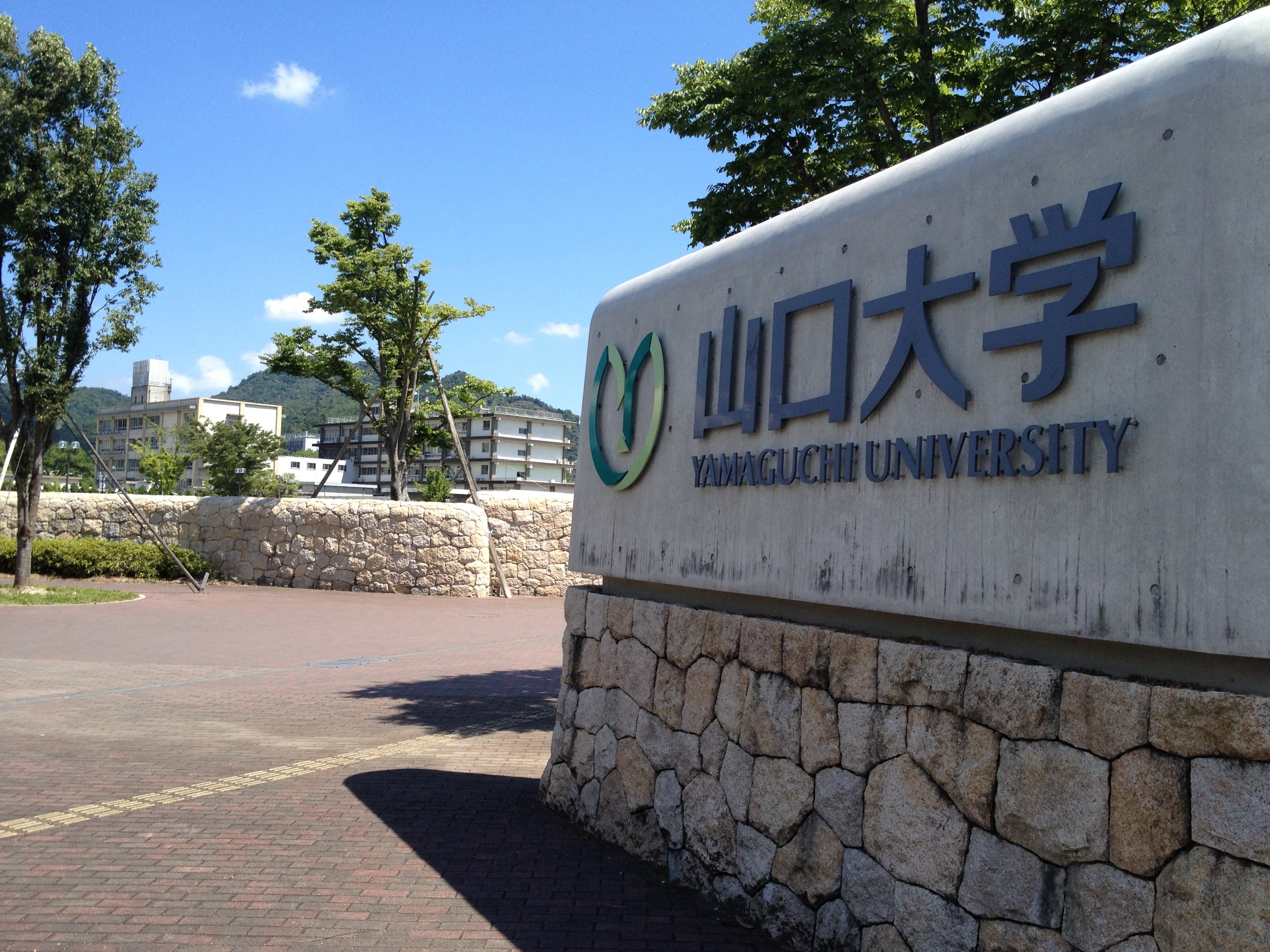 山口大学吉田キャンパス正門(2013)